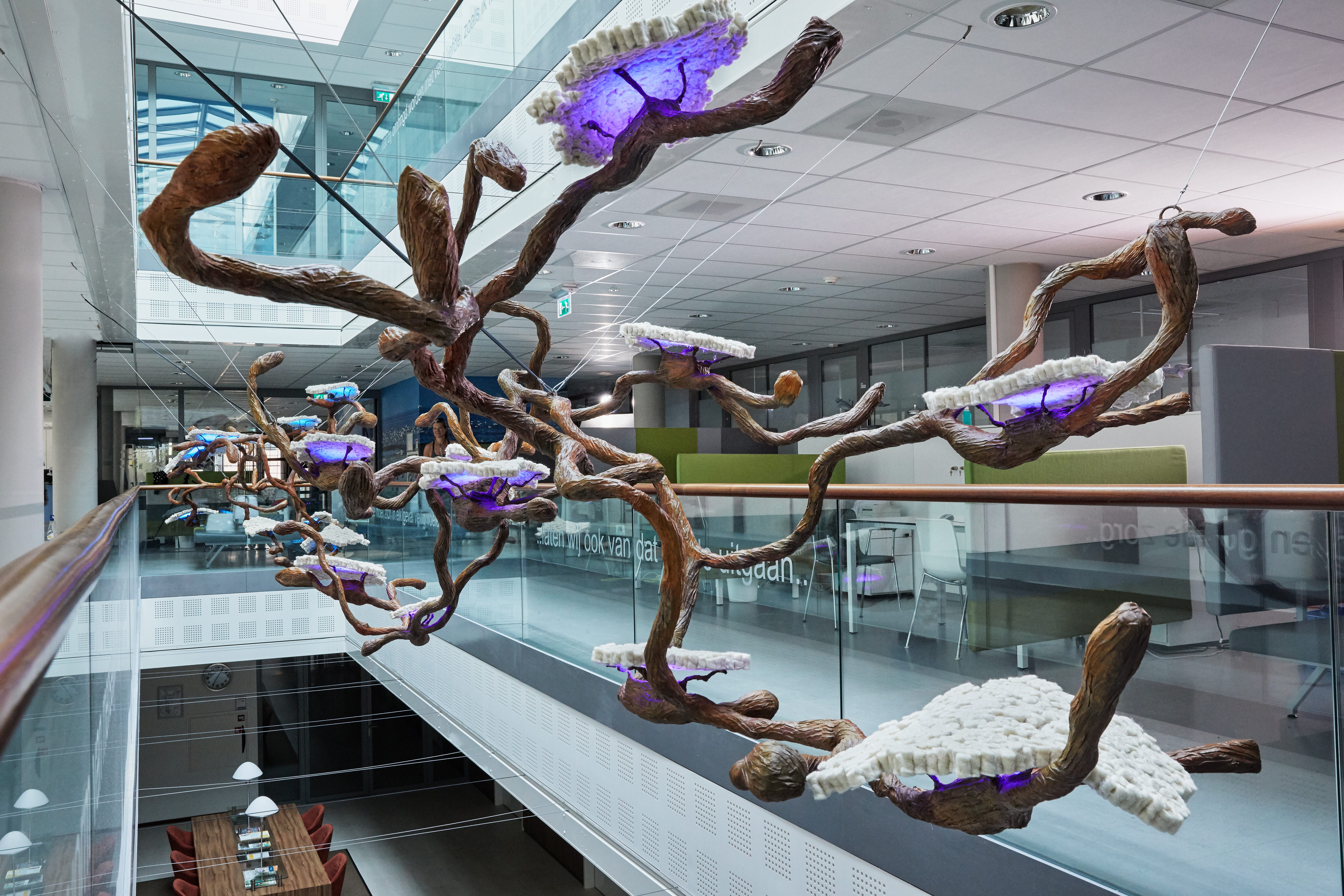 kunstwerk in Spaarne Gasthuis, Oncologie Centrum Hoofddorp, The Ocean Breathes - Sealight van Margot Berkman